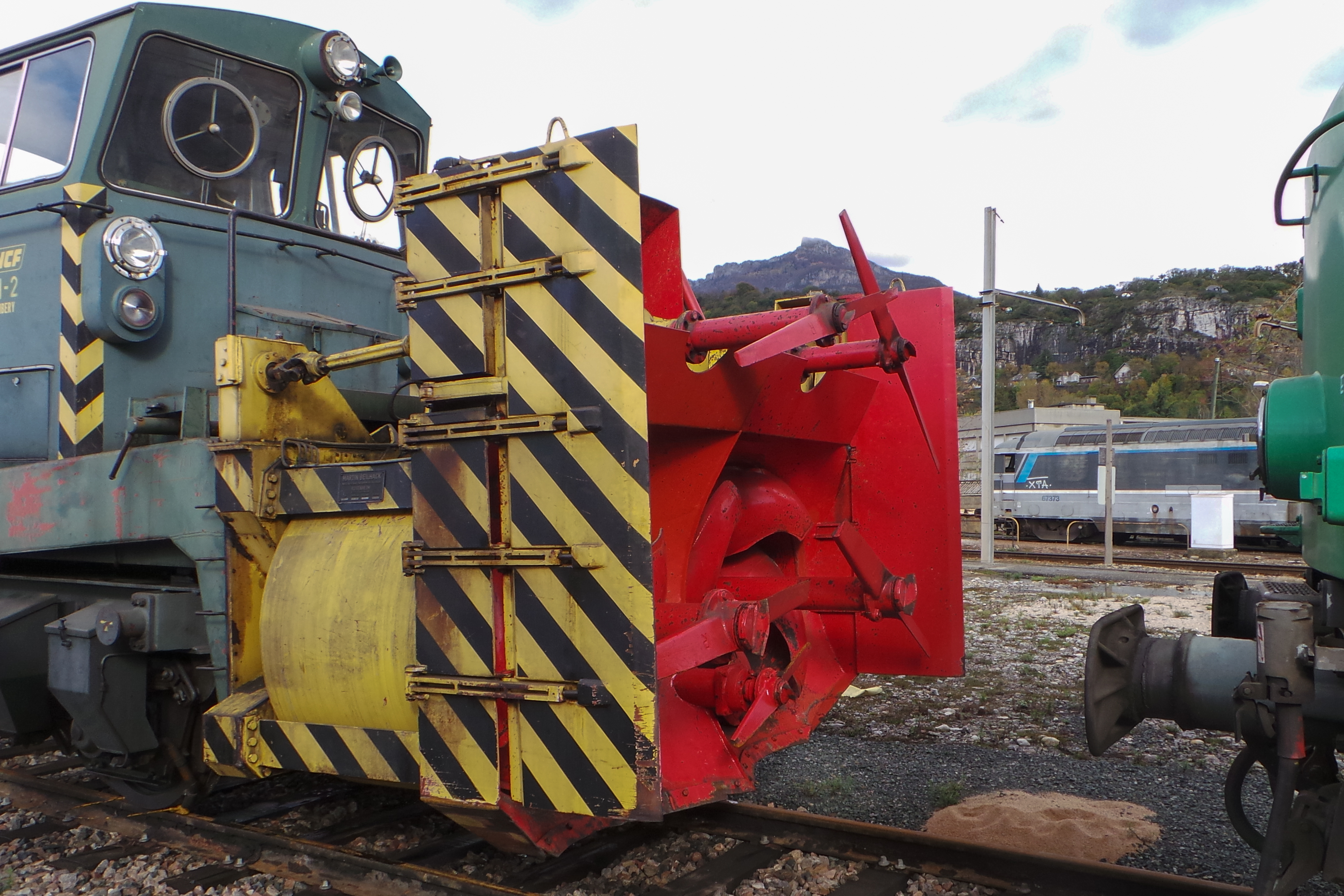 Chasse neige CN 2 Beilhack au dépot SNCF de Chambéry / Chambéry, Savoie, France